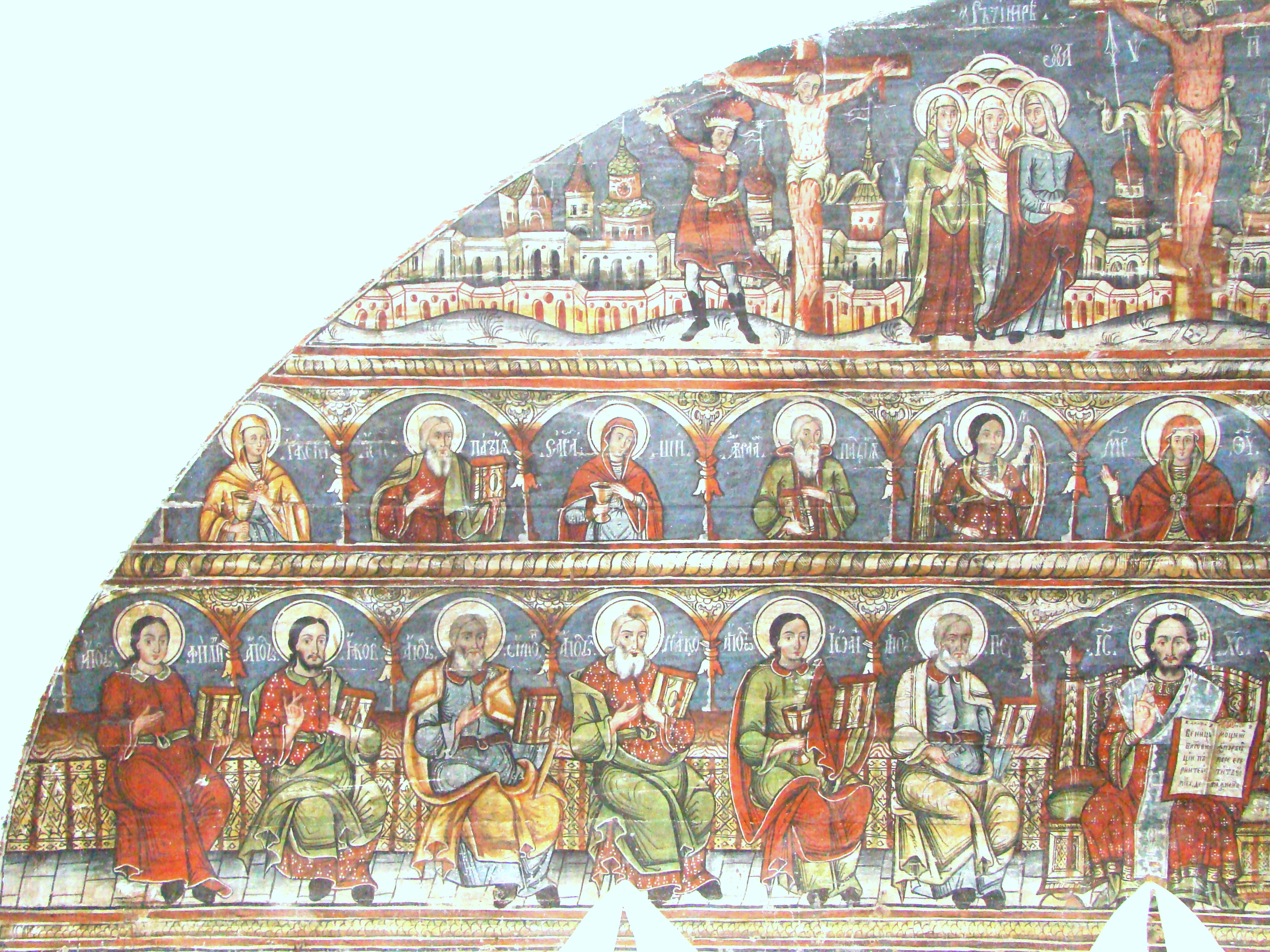 Biserica de lemn din Valea Largă-Alba